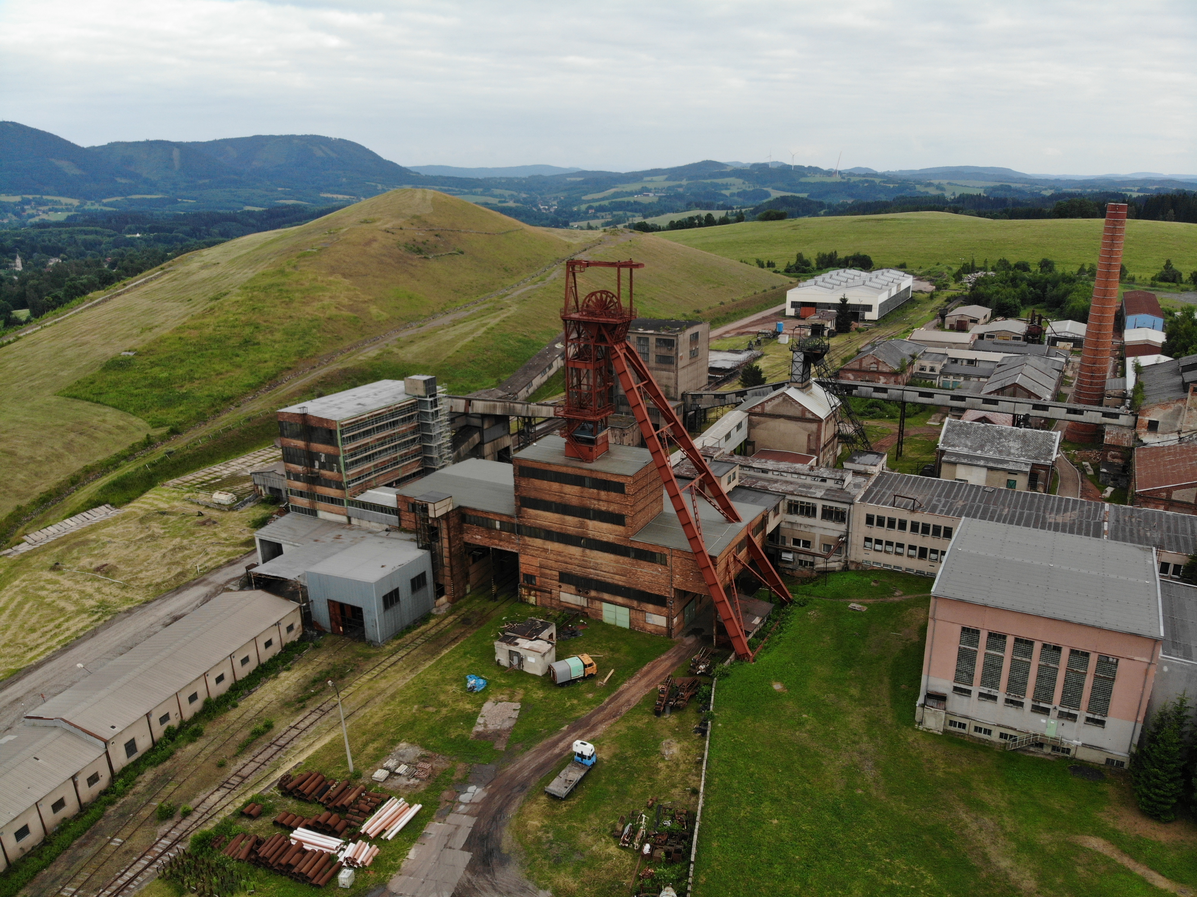 Jáma Julie